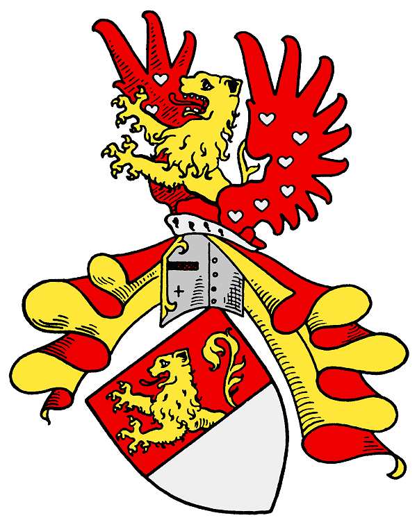 Stammwappen derer von Eltz